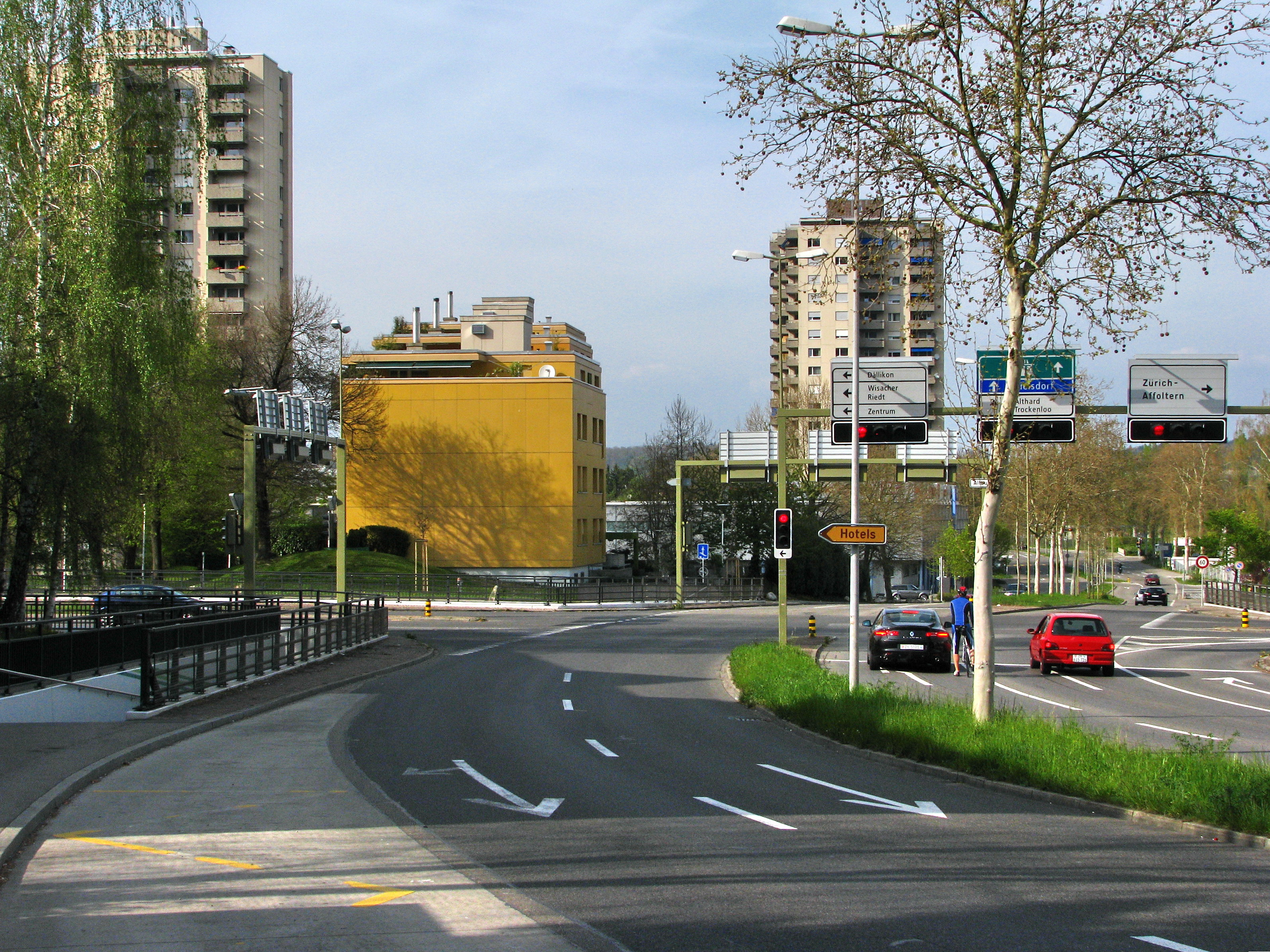 Regensdorf (ZH)